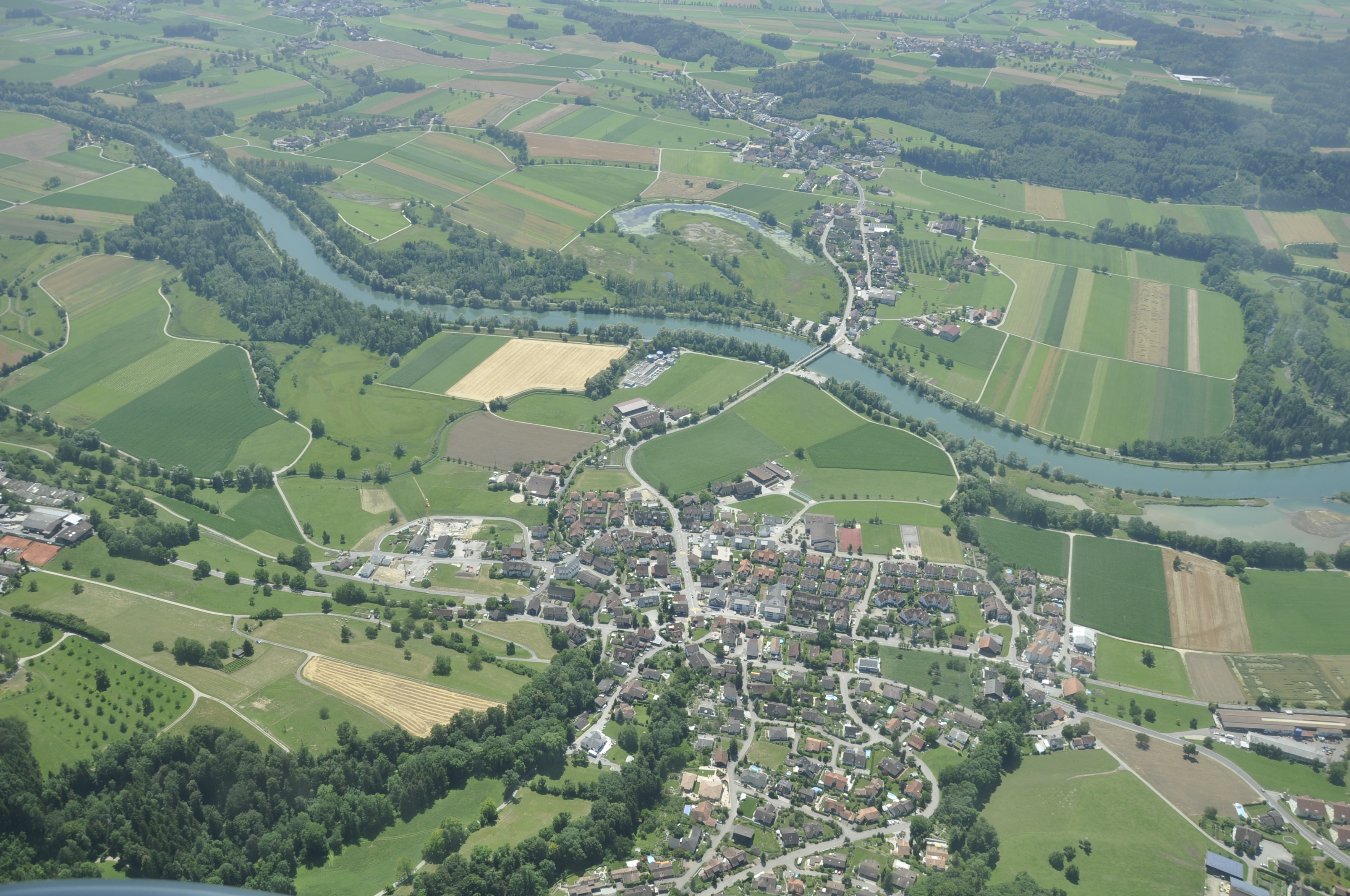 Unterlunkhofen aus der Luft